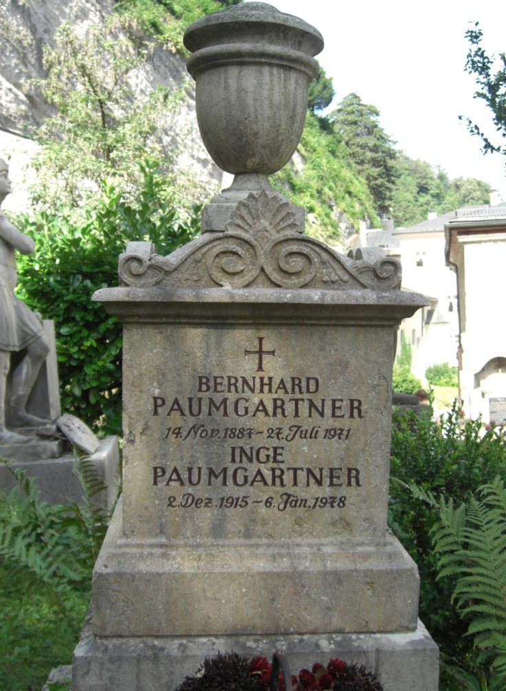 Grab des Gründungsmitglieds und Präsidenten der Salzburger Festspiele, Bernhard Paumgartner (1887-1971), auf dem Petersfriedhof in Salzburg